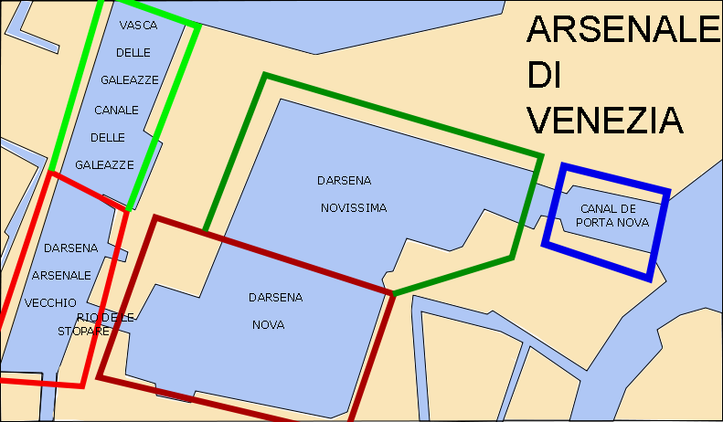 Basins de l'arsenal de Venise.